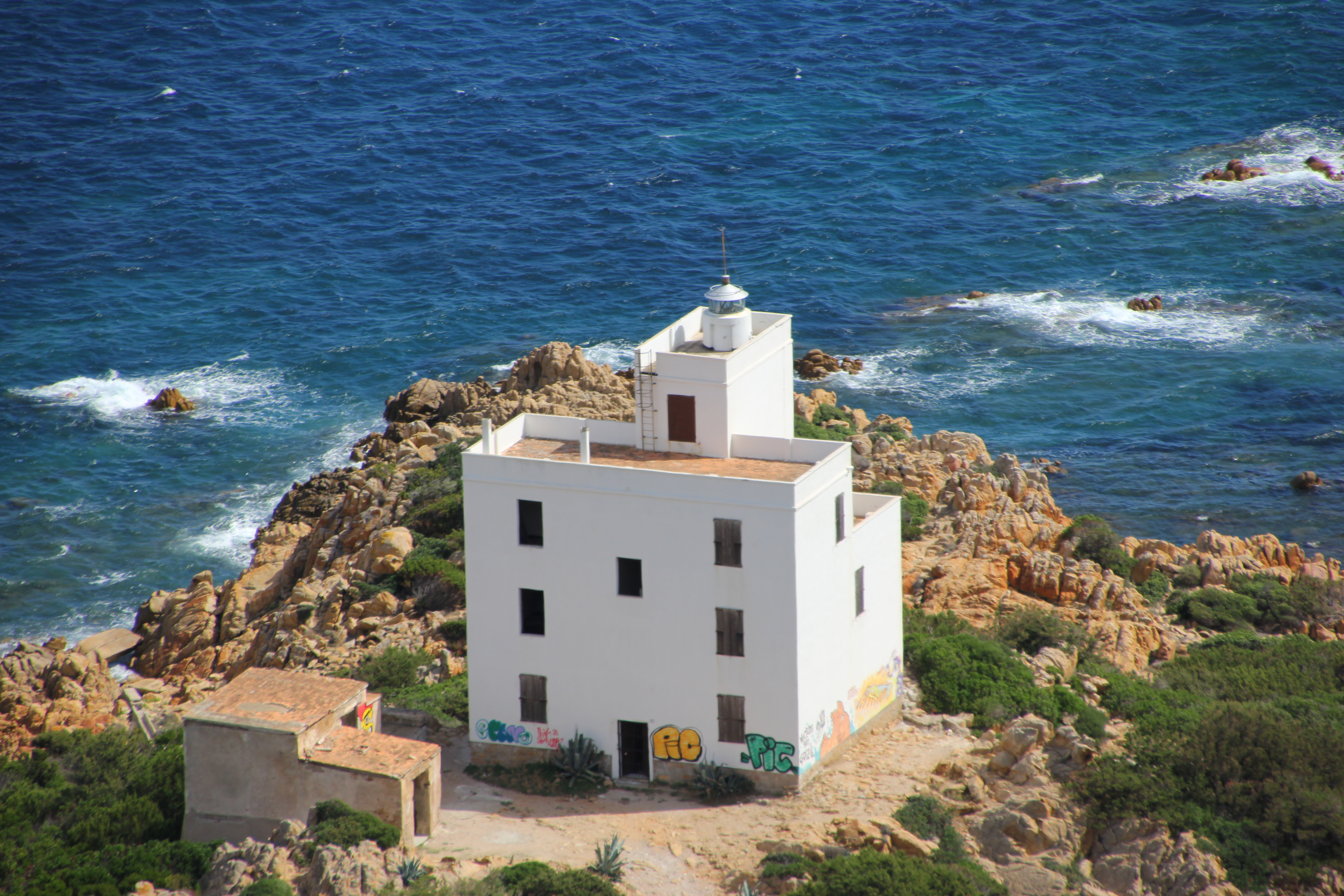 Siniscola - Faro di Capo Comino